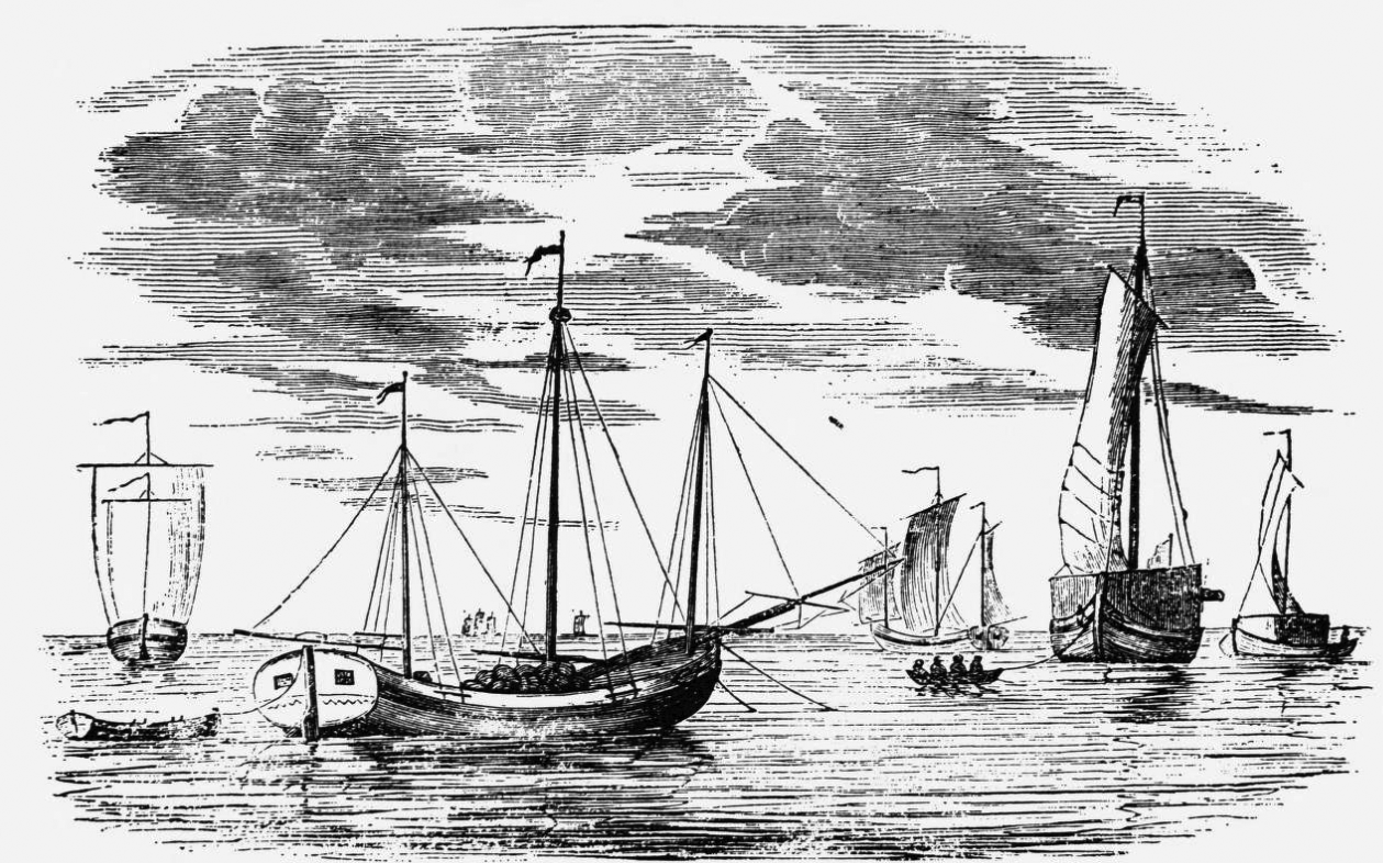 Russiske lodjer driver fiskeoppkjøp i Finnmark i 1845. Illustrasjon fra Skilling-Magazin 1845